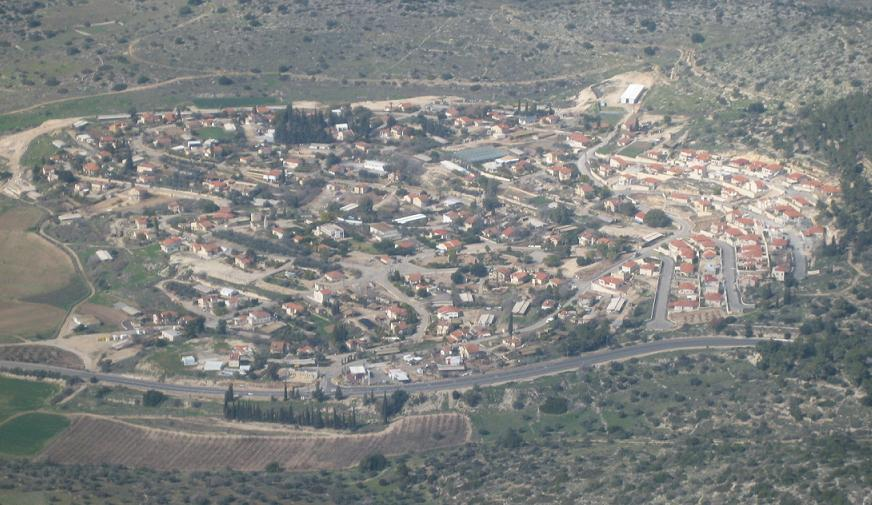 זכריה. צילום אוויר לכיוון מערב.